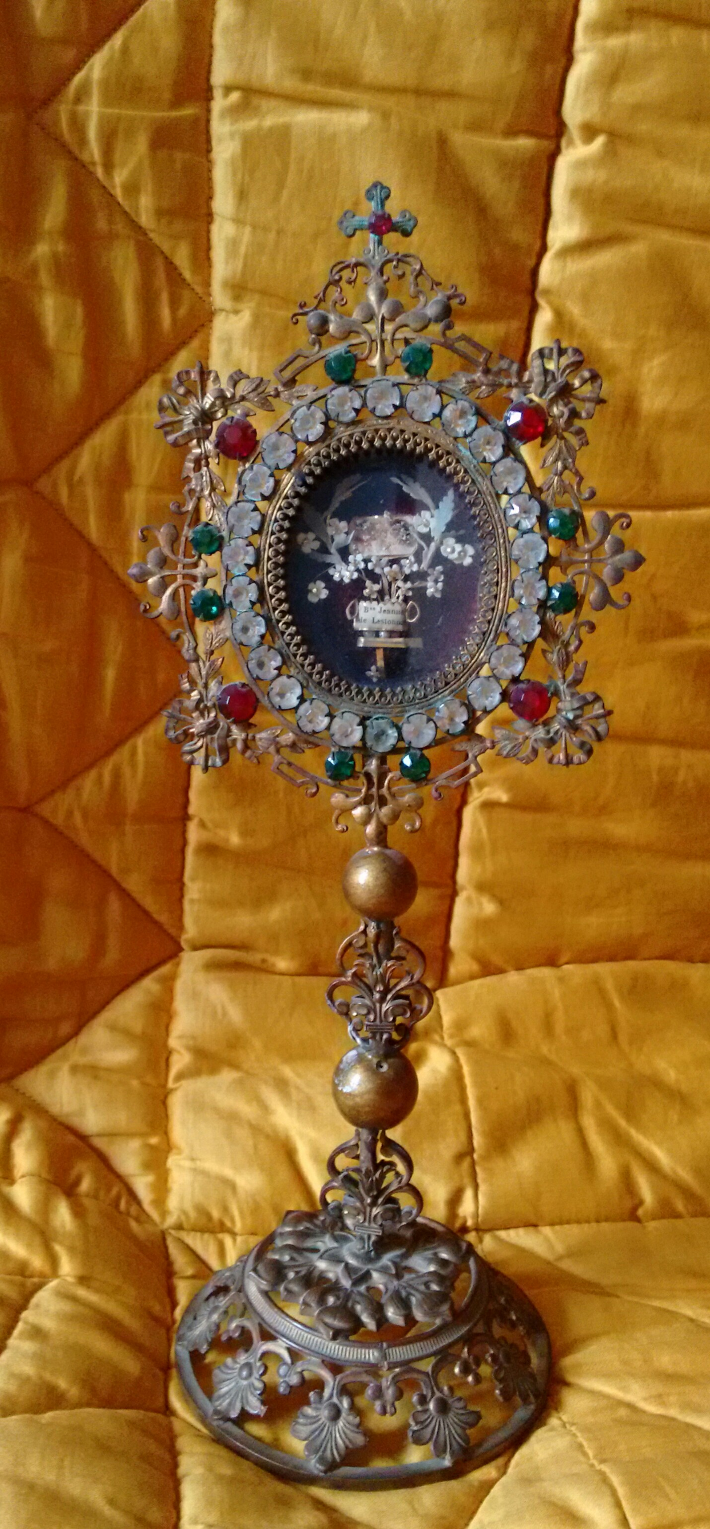 Reliquaire de sainte Jeanne-de-Lestonnac fondatrice de la Compagnie de Marie-Notre-Dame, béatifiée en 1900 par le pape Léon XIII et canonisée le 15 mai 1949 par le pape Pie XII.